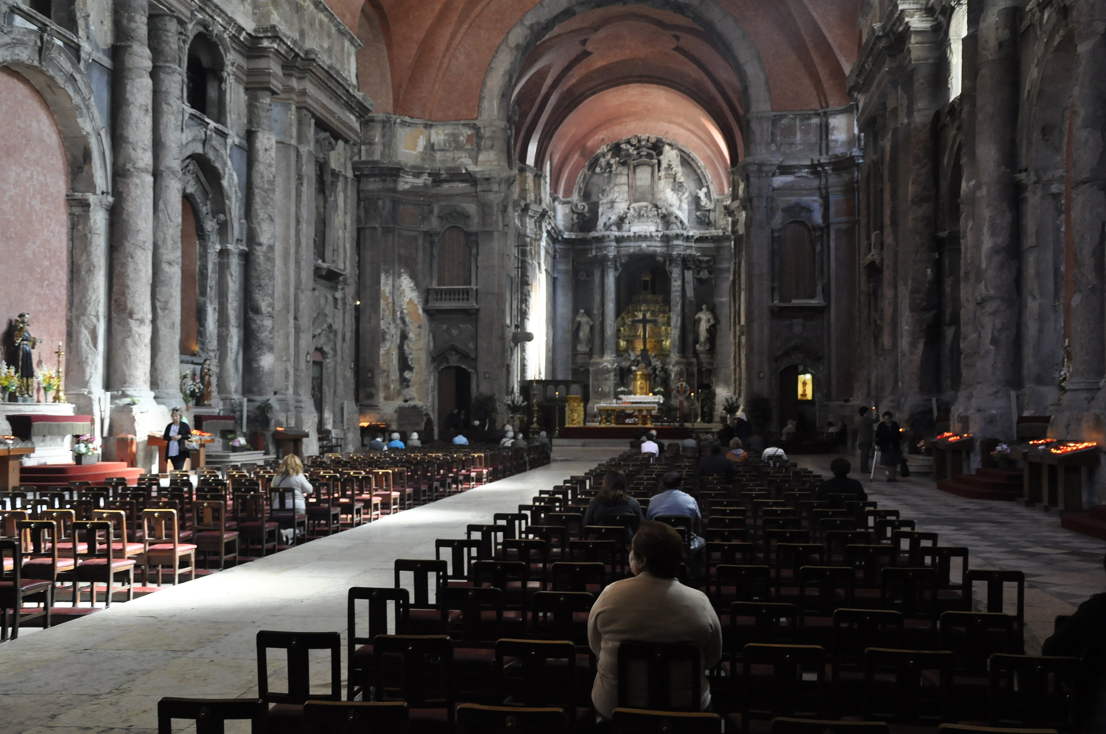 De Dominicanenkerk Santa Justa in Lissabon